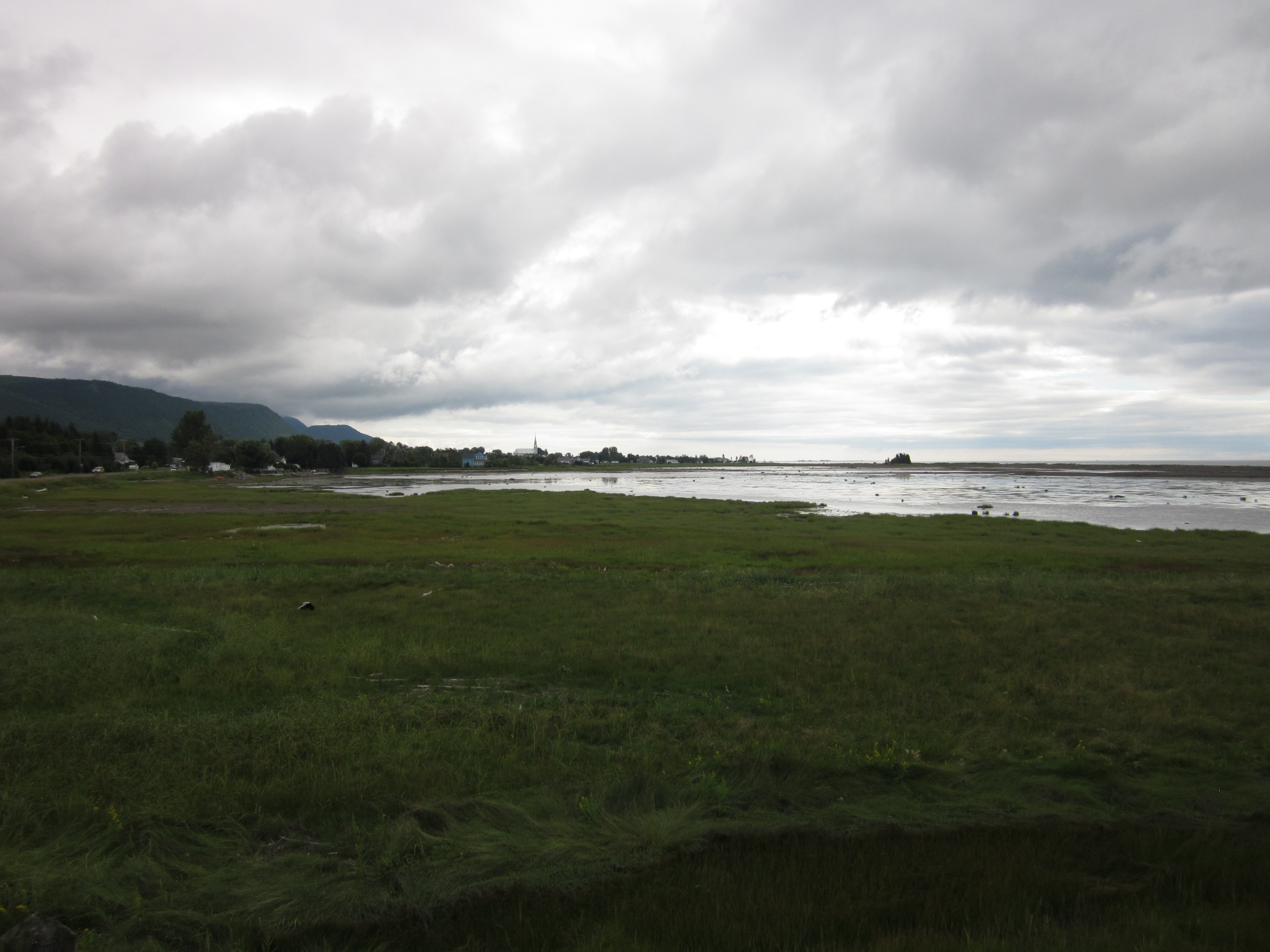 Refuge d'oiseaux de Saint-Omer à Carleton-sur-Mer